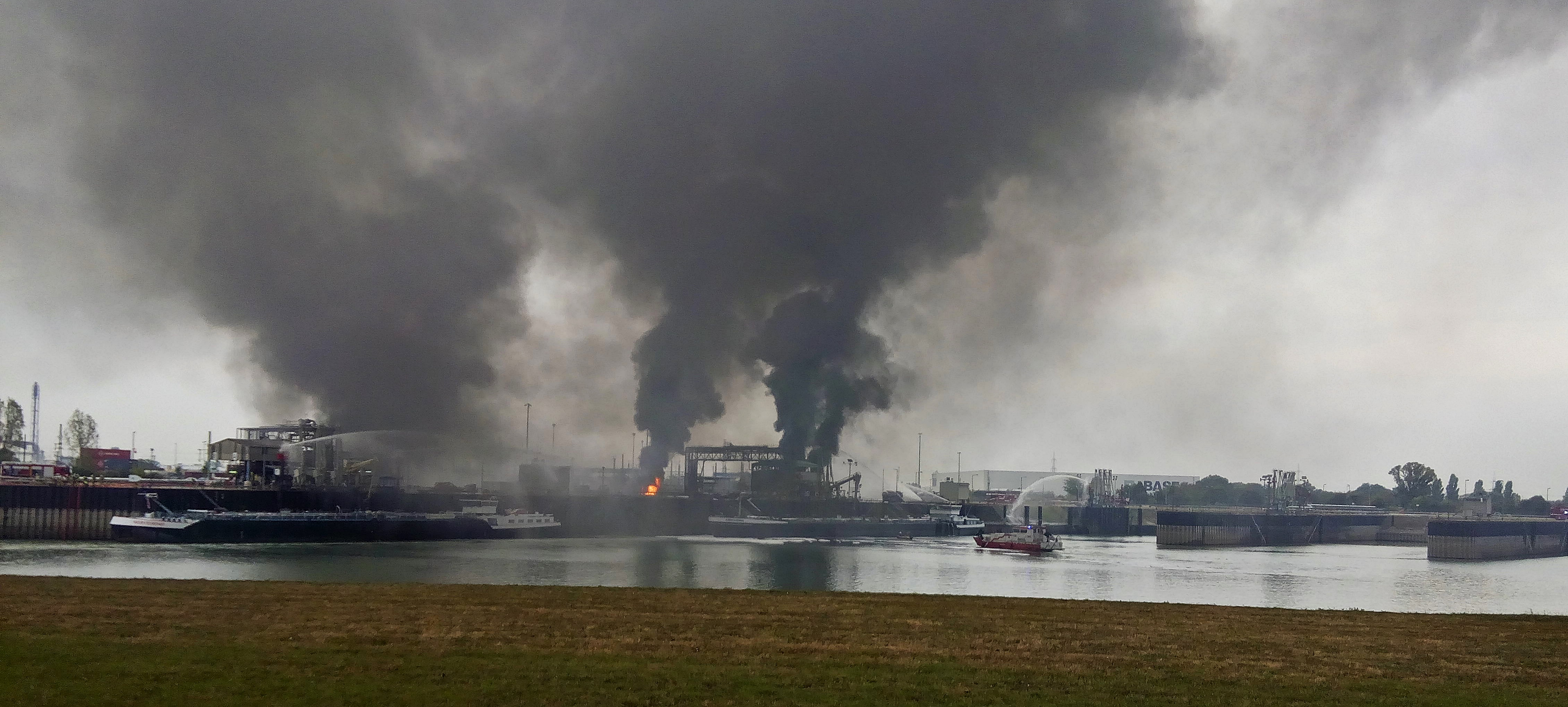 Unfallstelle um 12.45